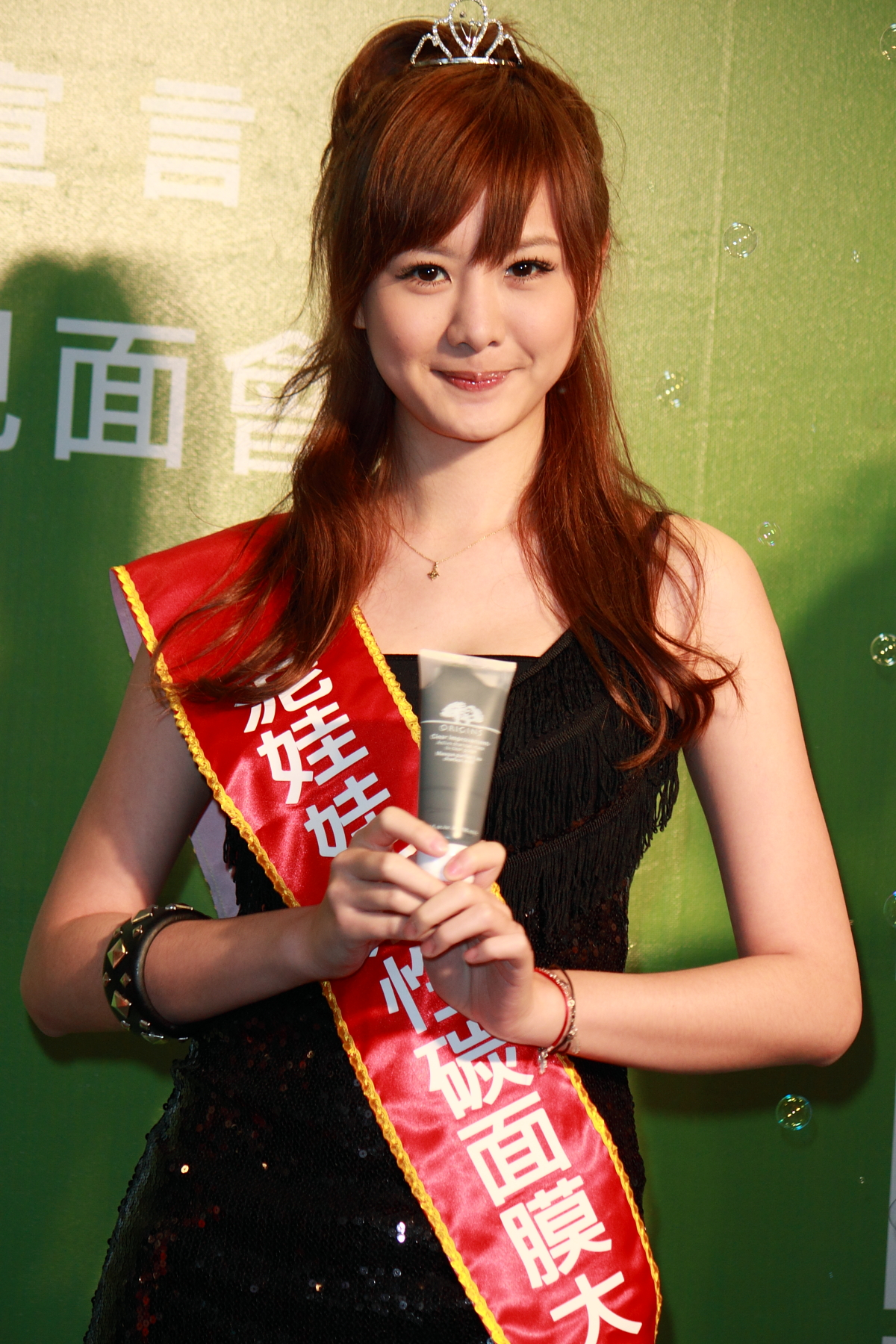 安心亞於2010年3月8日台北市品木宣言活動 Bân-lâm-gú: An Sim-a. 安心亞